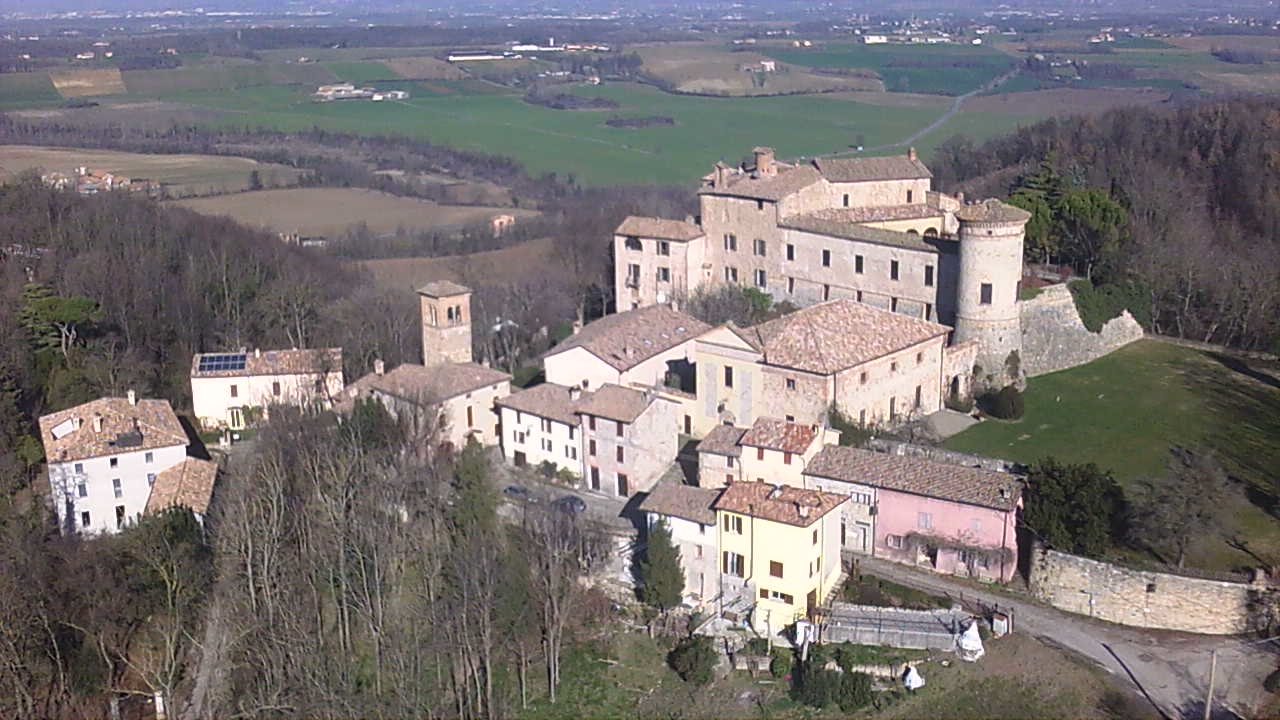 Scipione castello ripreso da un drone - Carlo Palmieri